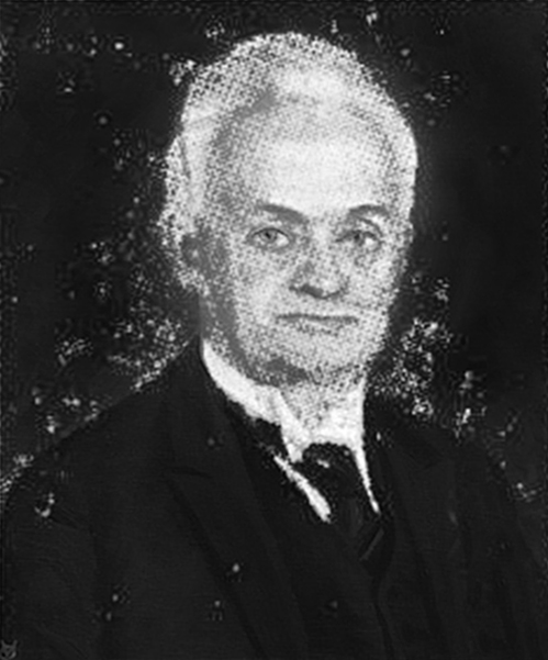 יצחק בנרובי